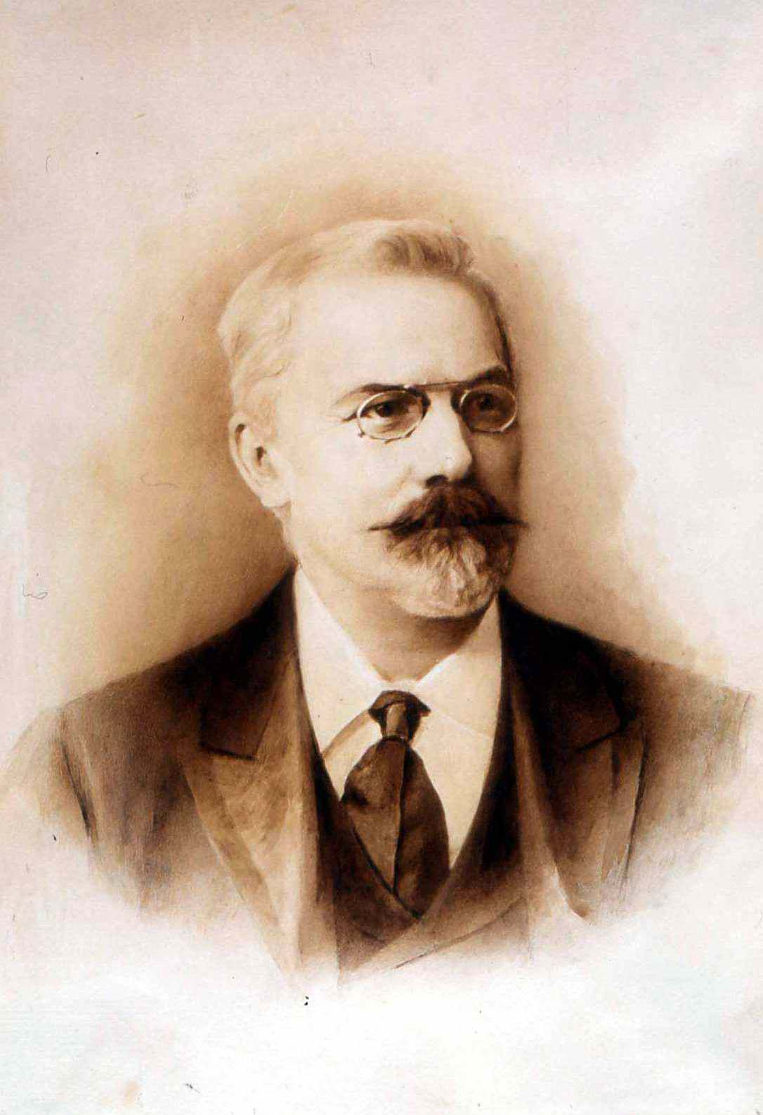 Владимир Прохорович Амалицкий (1860-1917) - русский геолог, палеонтолог, исследователь пермских позвоночных.